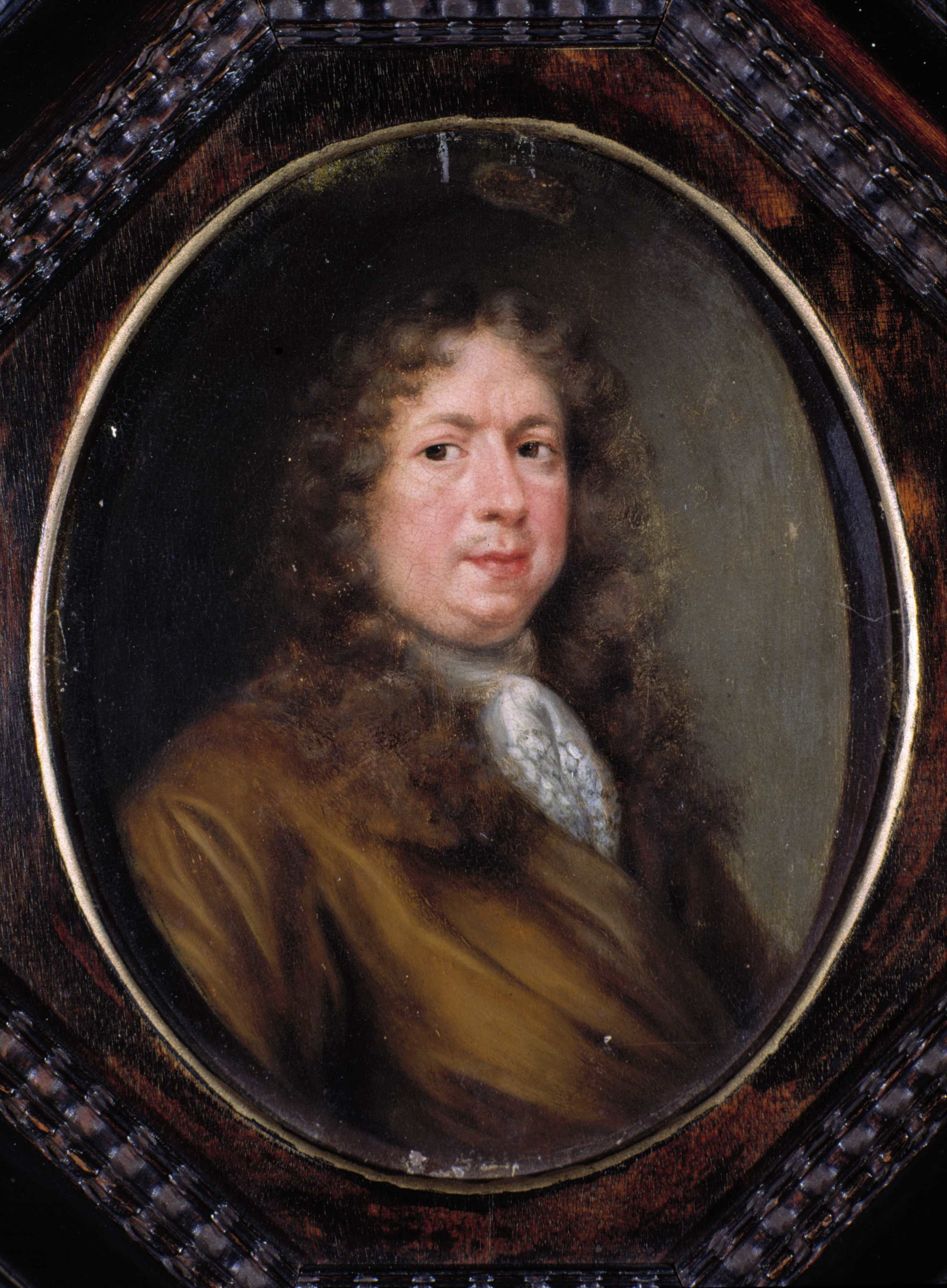 Friderich Grüner (1628-1674), myntmester ved myntverket i Christiania, (Oslo)